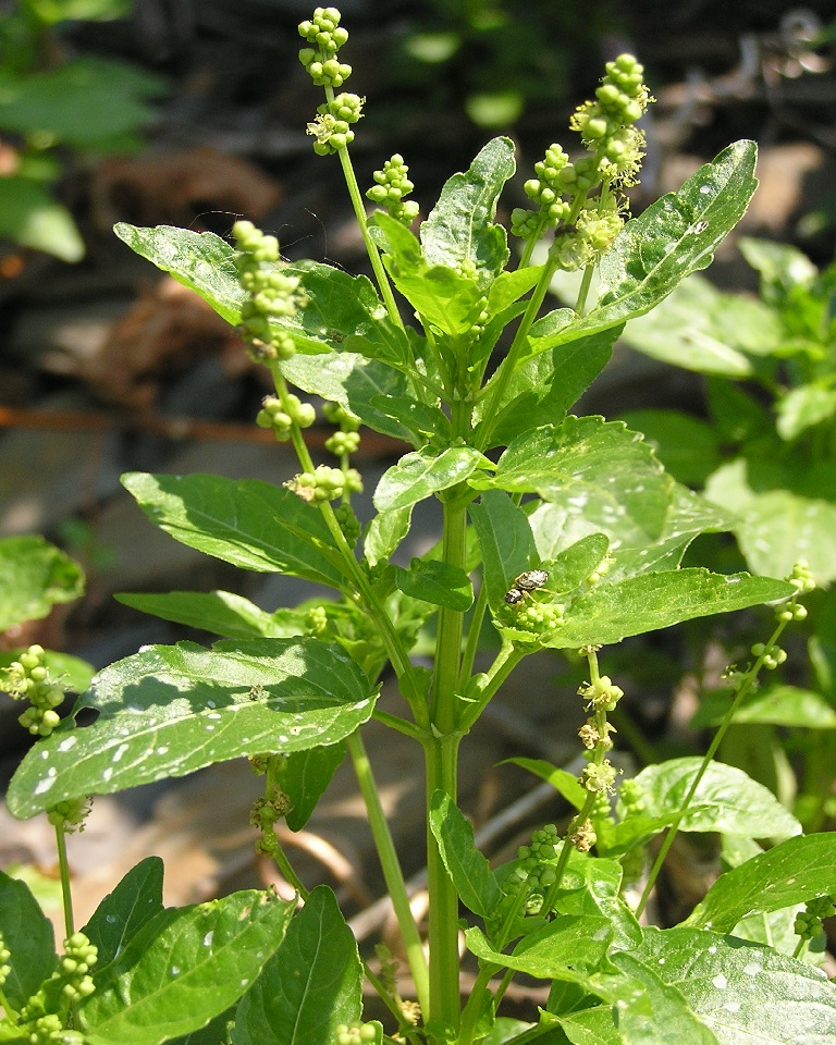 Mercurialis annua, männliche Pflanze, aufgenommen in den Weinbergen über Mayschoß (Ahrtal, Deutschland).